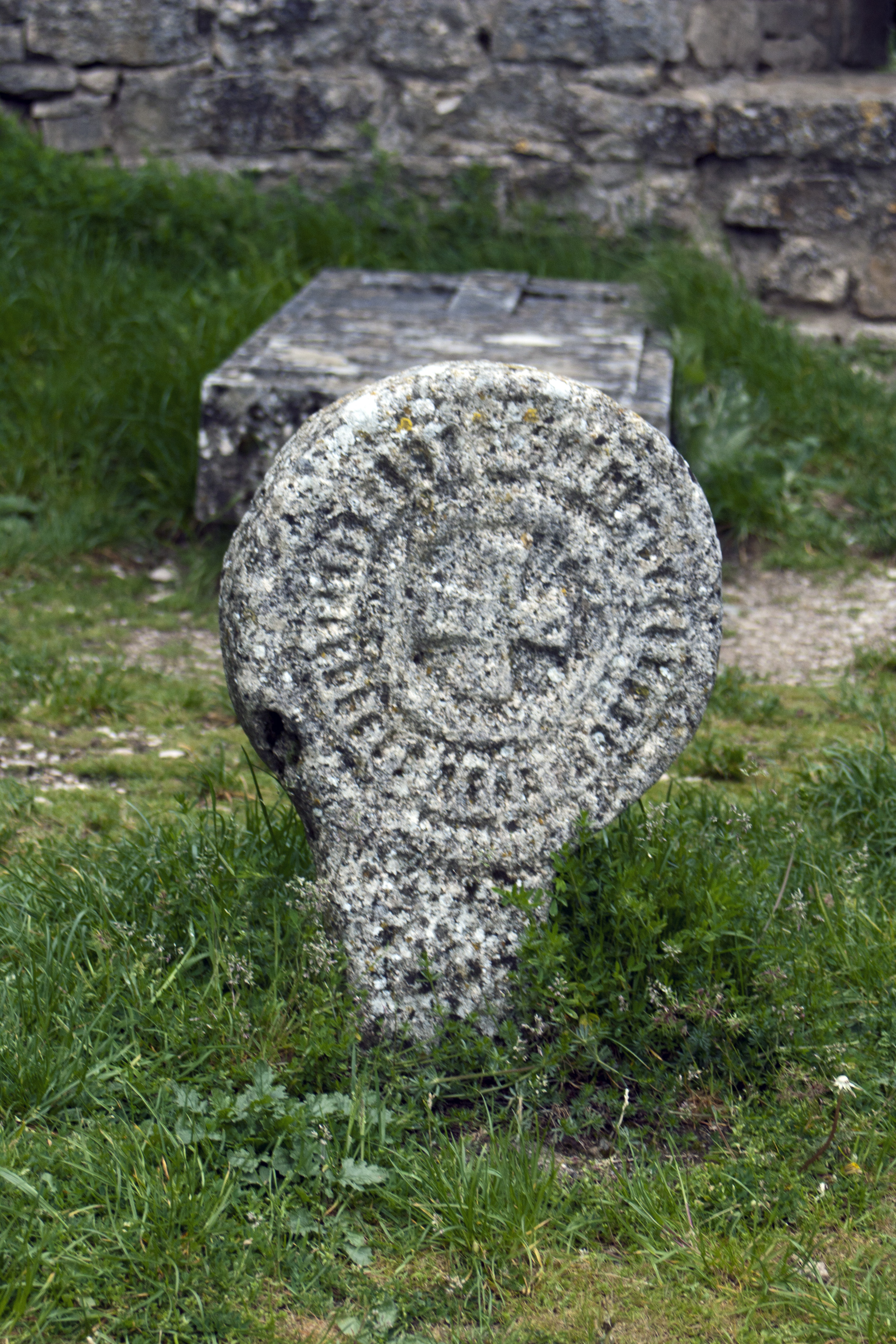 Discoid stele.